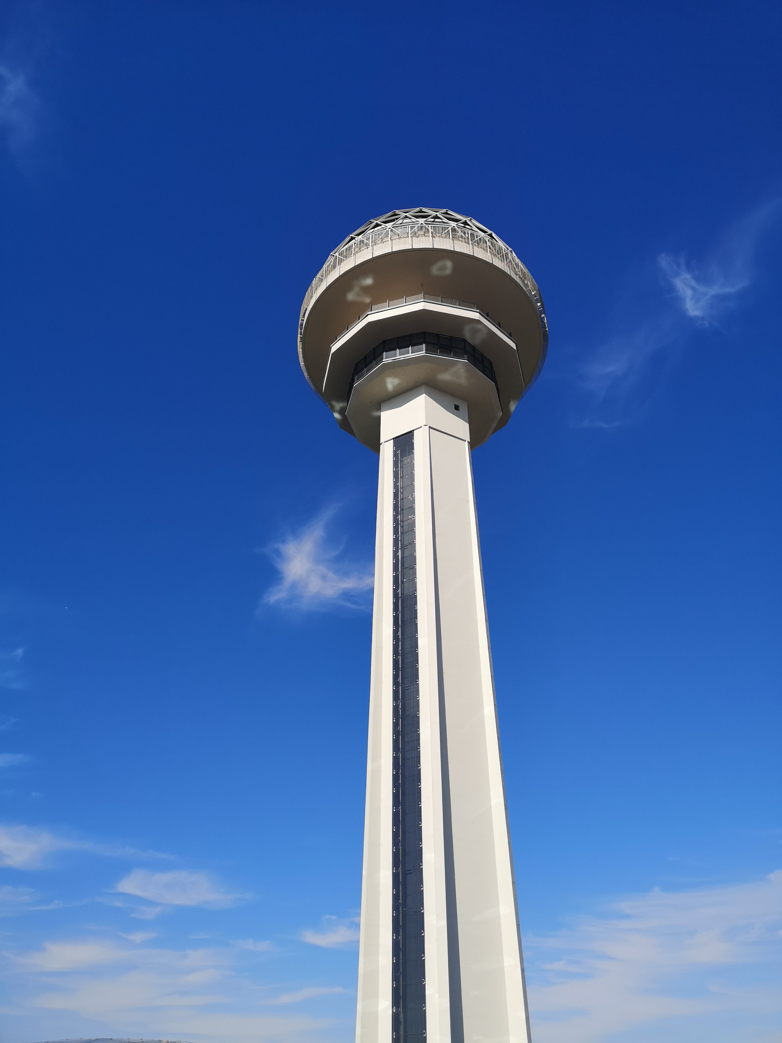 Atakule AVM'nin terasından kule.